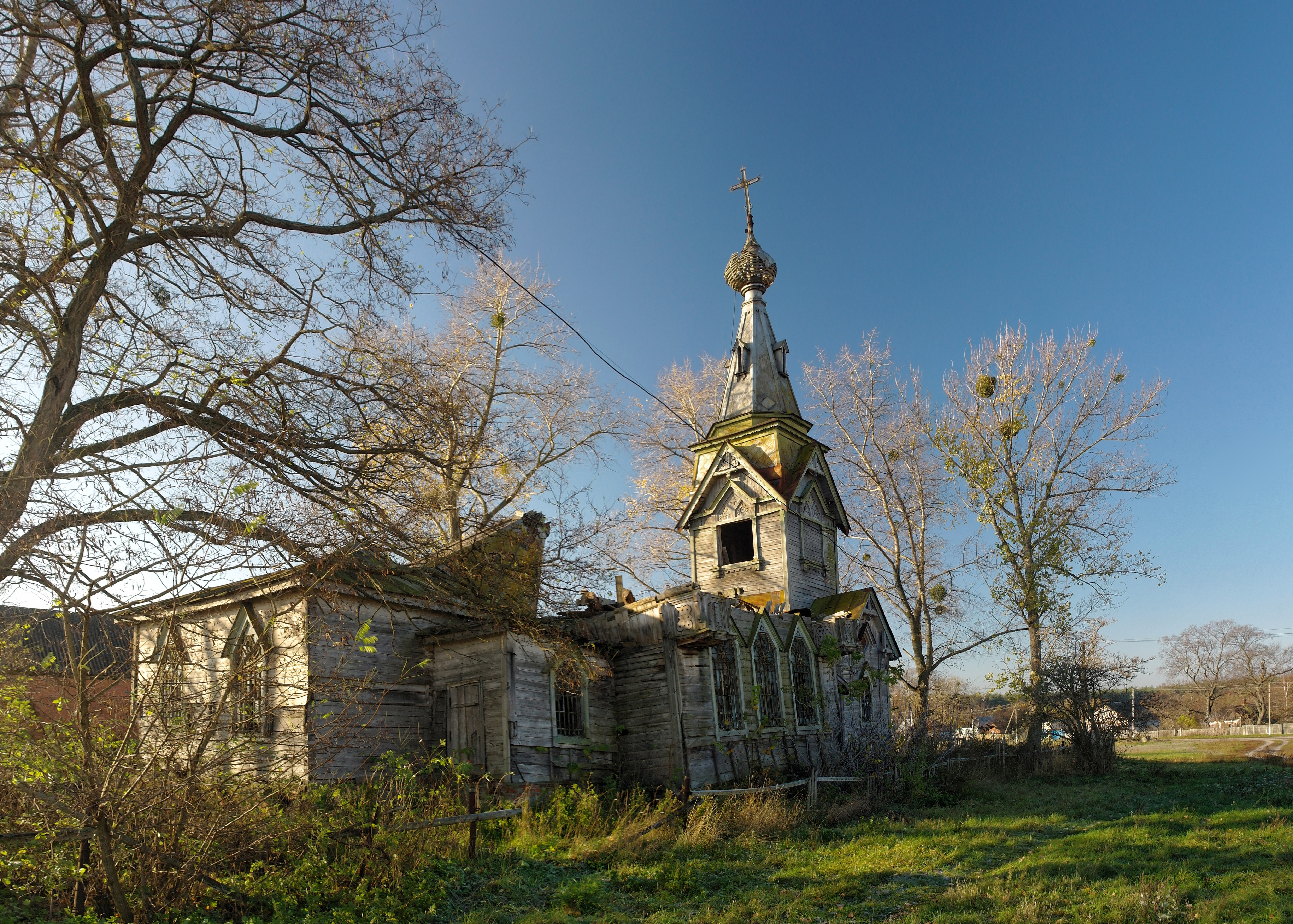 Церква Святої Параскеви П'ятниці (с. Бакирівка, Сумська обл., Україна)